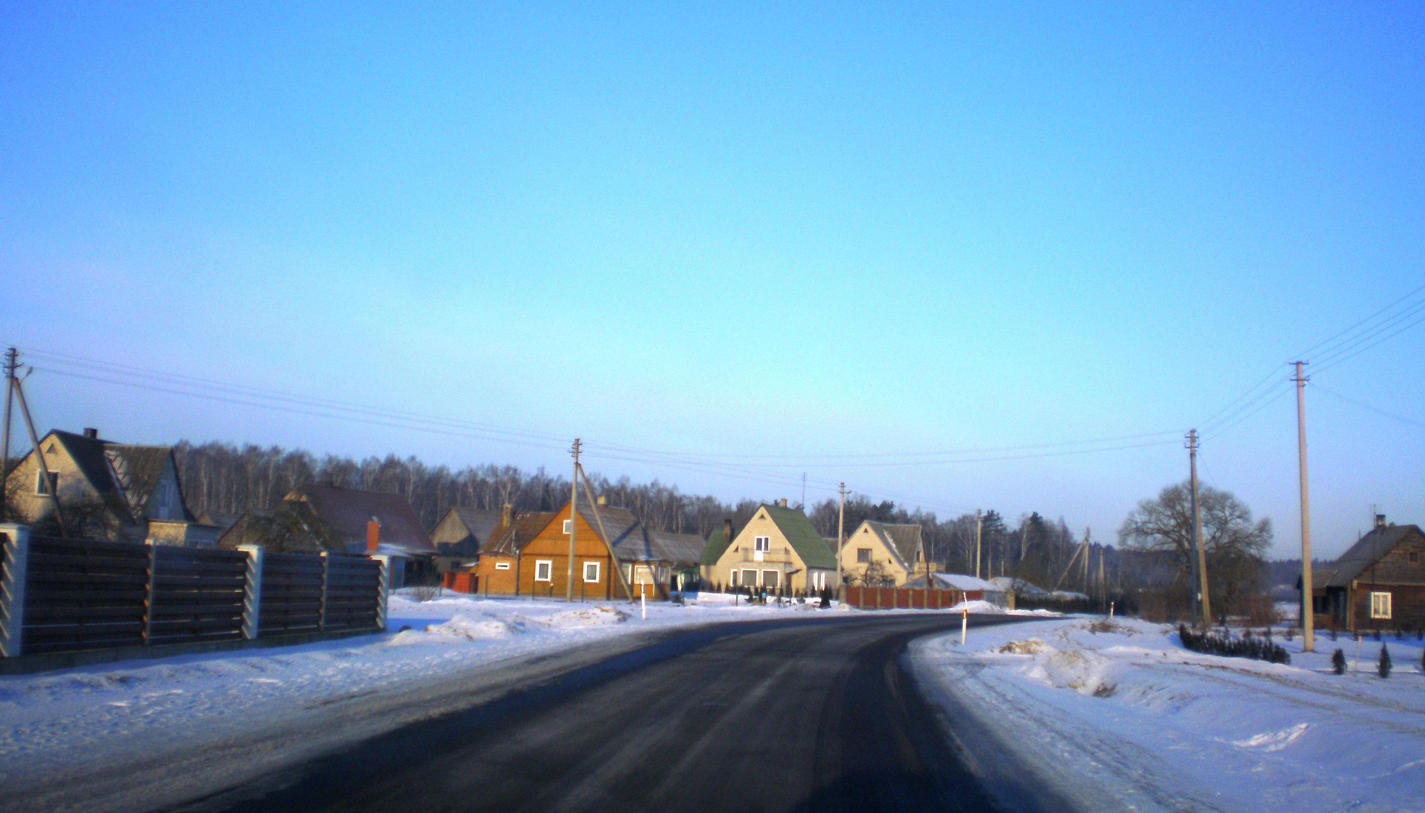 Zūbiškės, Kaišiadorių raj.